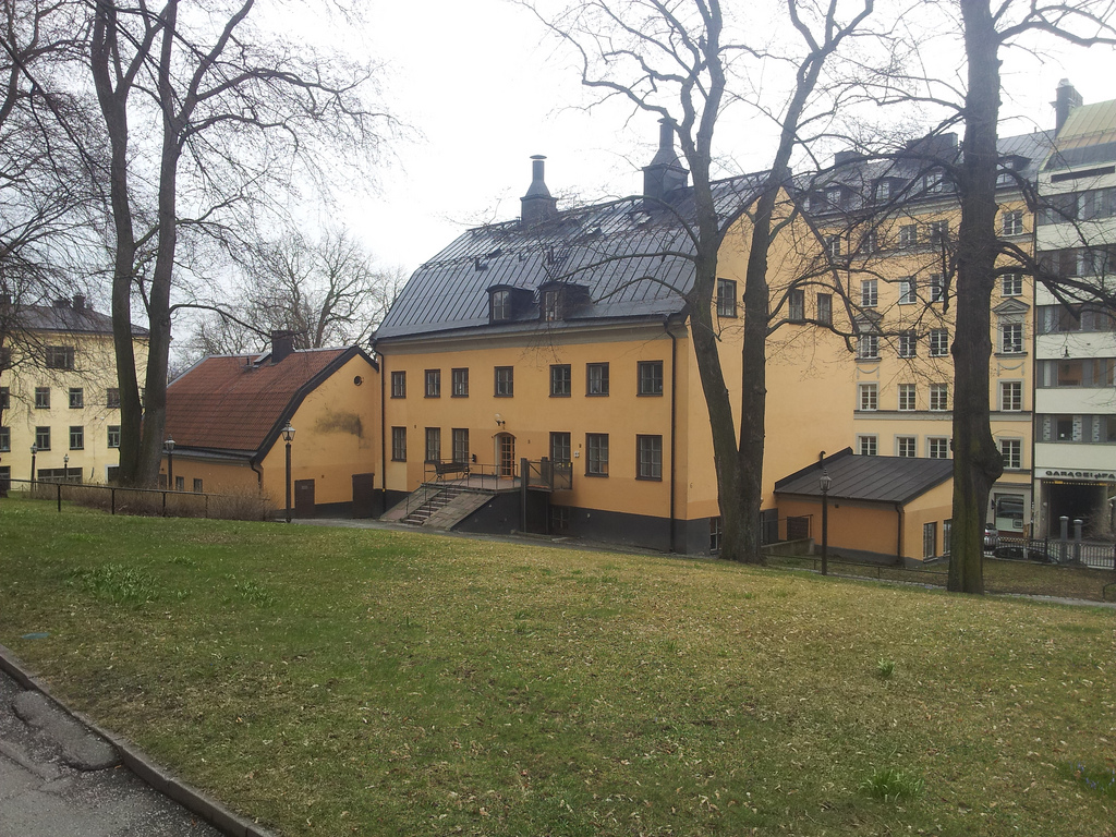 Gamla fattighuset vid Kungsholms kyrka, nyttjas idag för församlingens barn- och ungdomsverksamhet och samkväm.